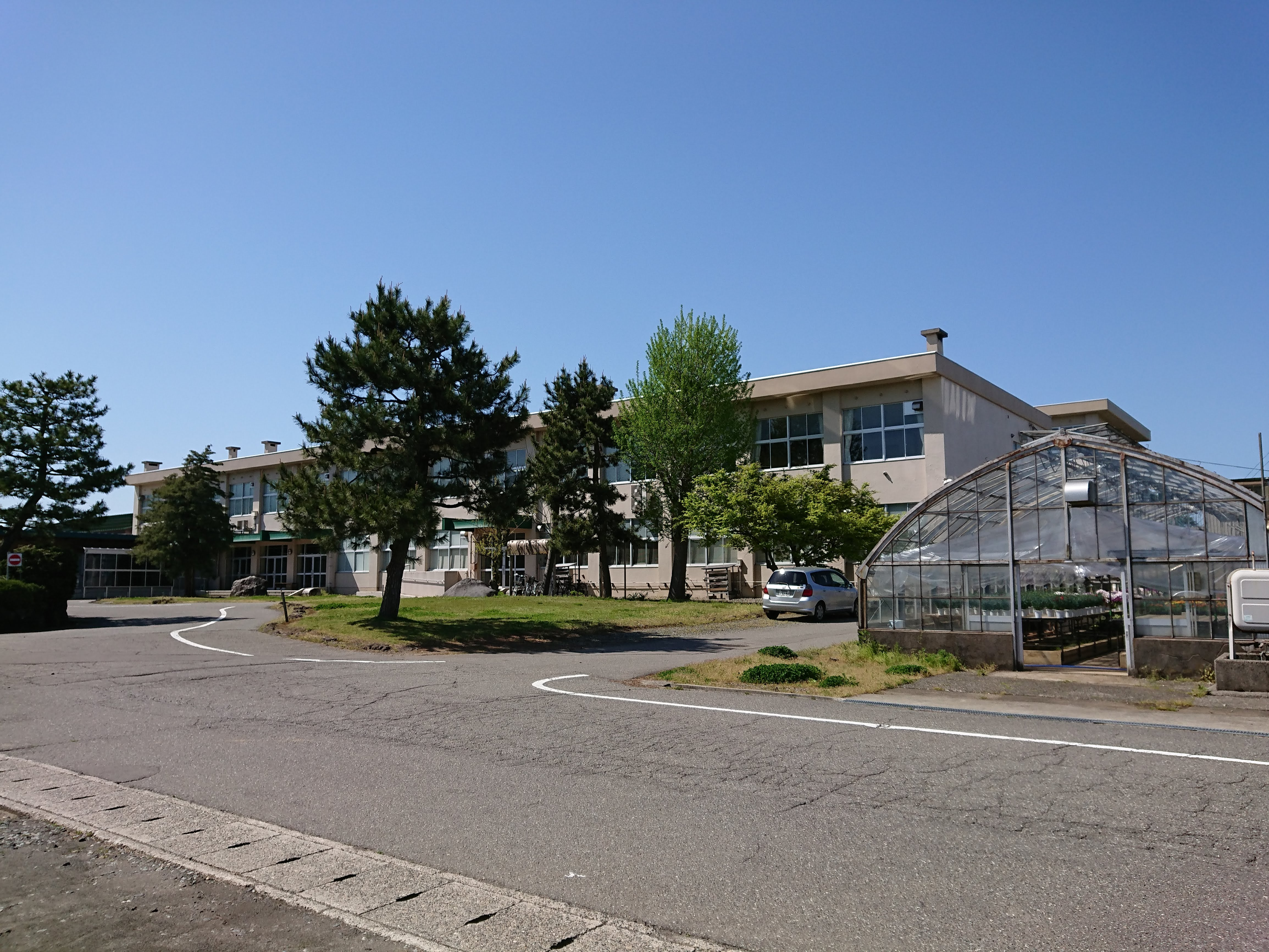 新潟県立柏崎総合高等学校の校舎